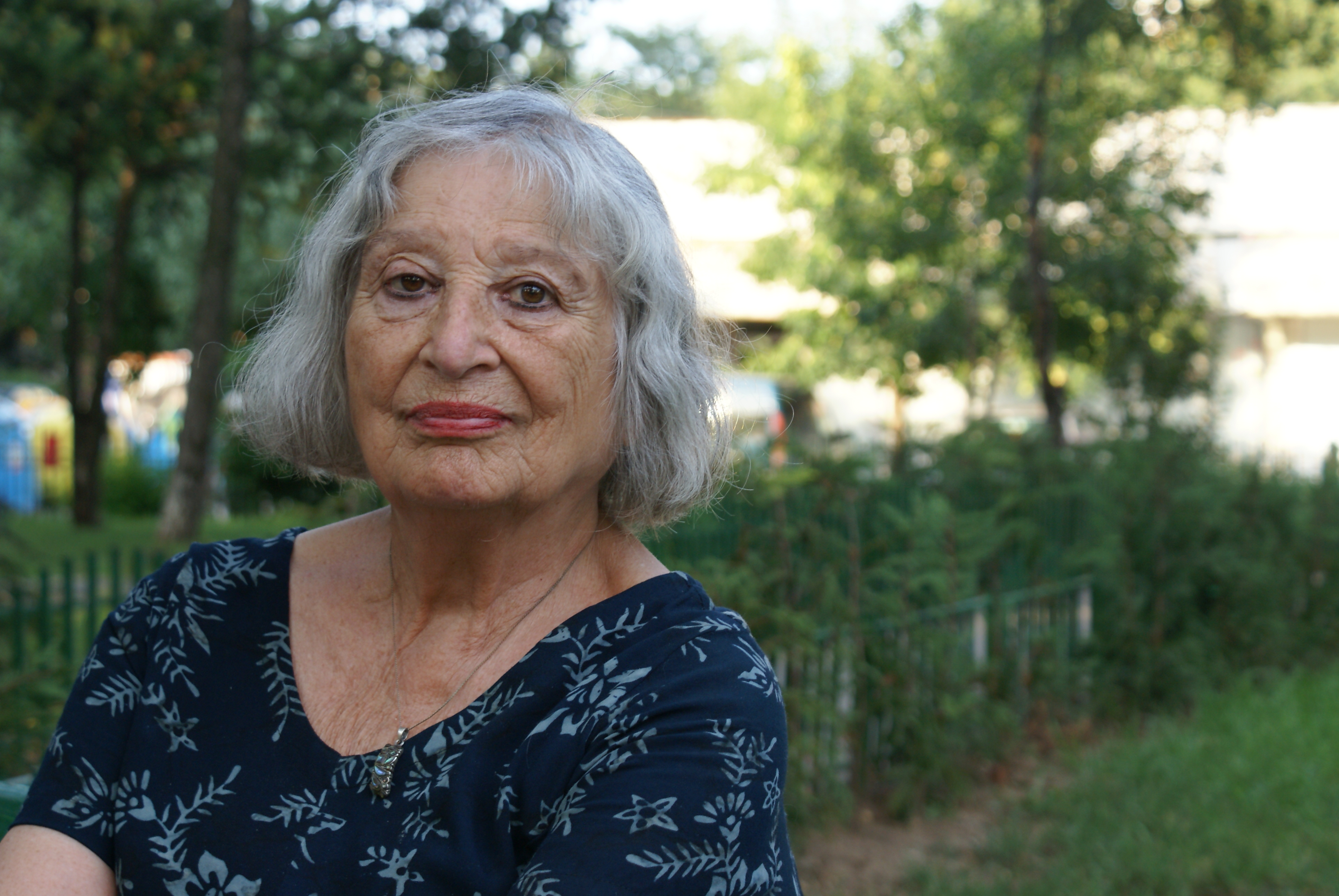 Nora Iuga fotografiată în cartierul Titan. (fotografie realizată de Victor Jalbă-Șoimaru, Casa de pariuri literare)